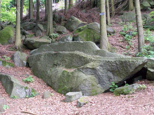 römisches Werkstück „Schiff“ im Felsenmeer (Lautertal)